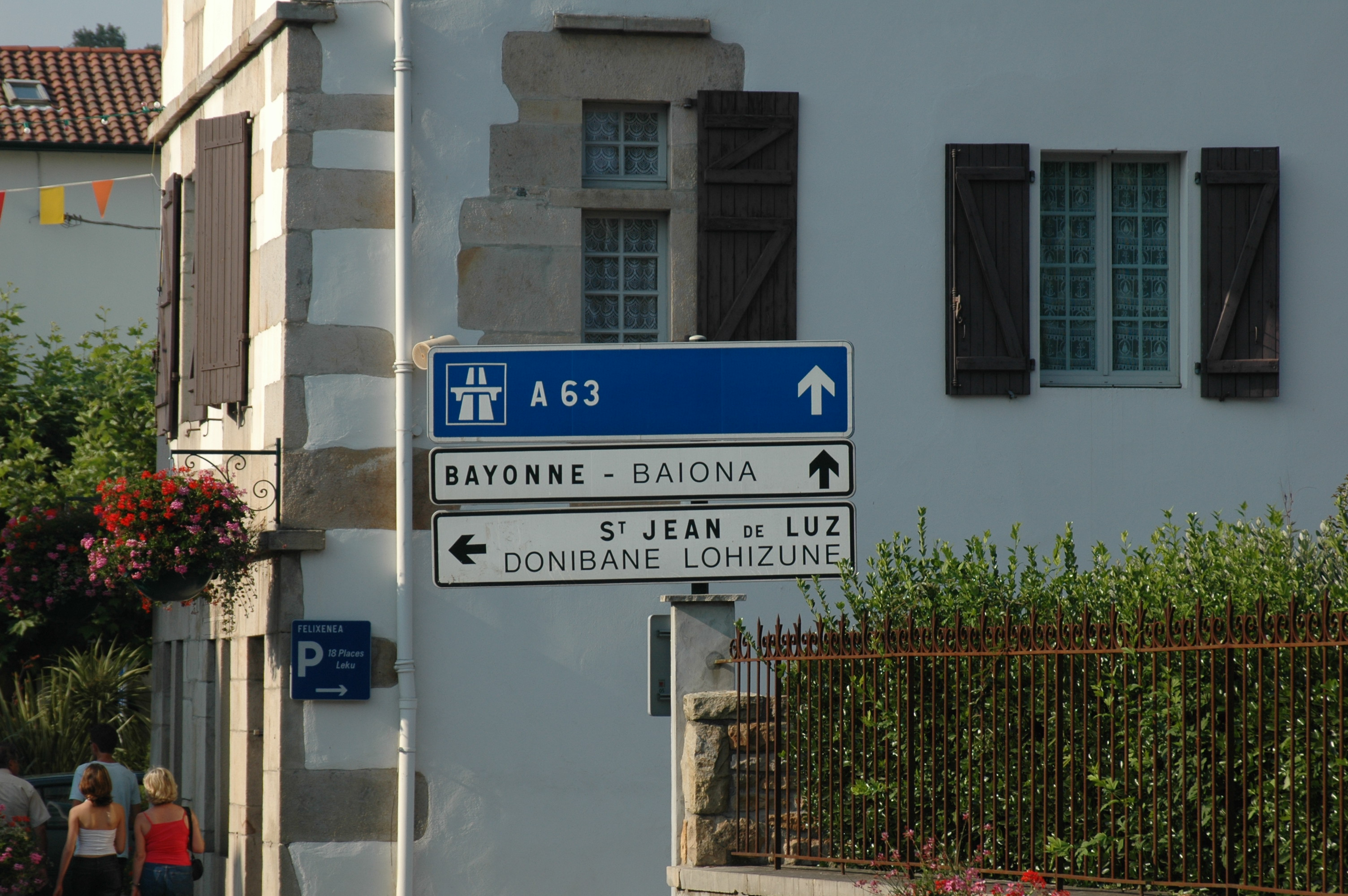 Saint-Pée-sur-Nivelle, panneau bilingue, photo prise le 08/07/06 par Harrieta171